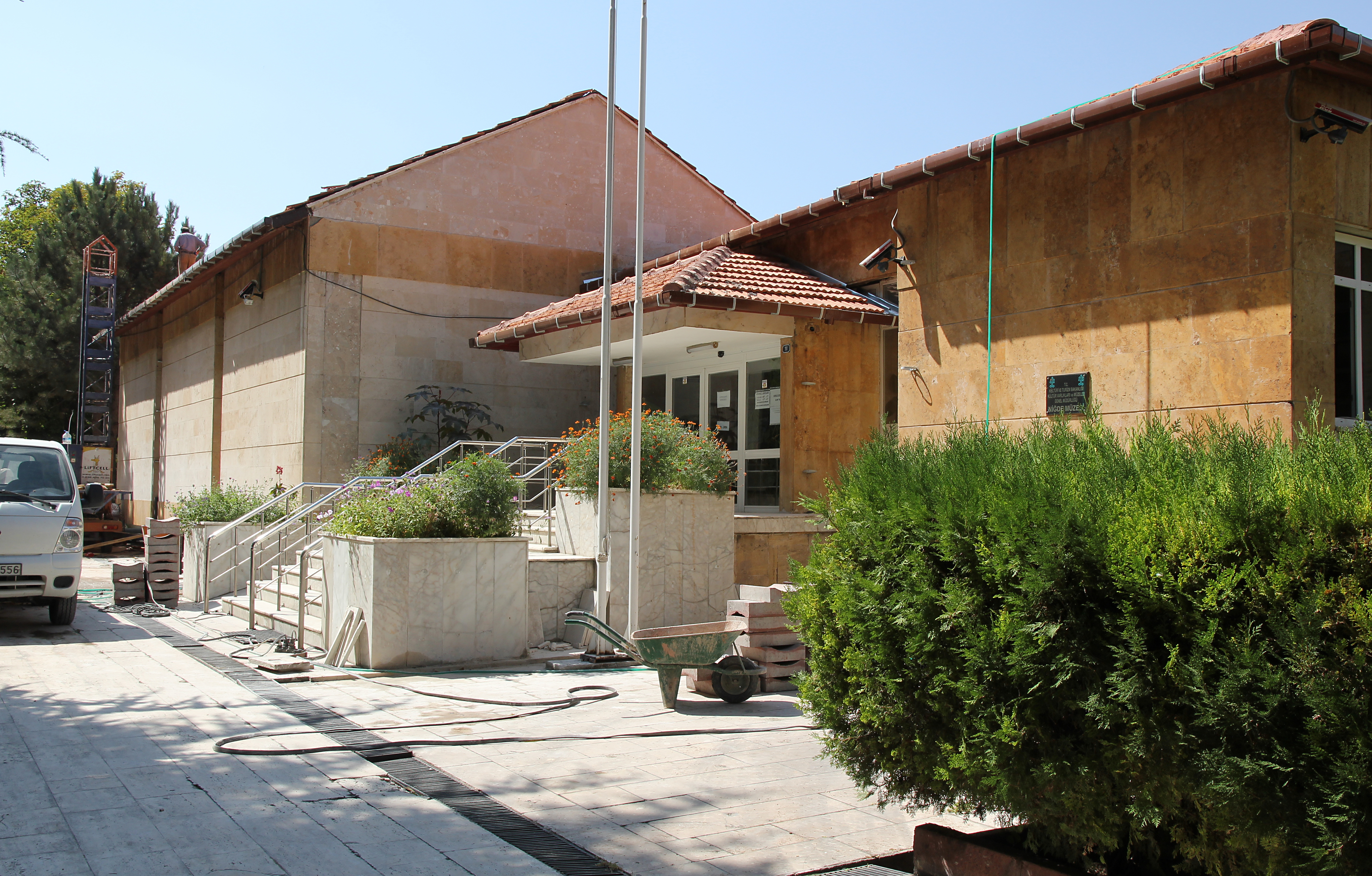 Archäologisches Museum Niğde, Türkei